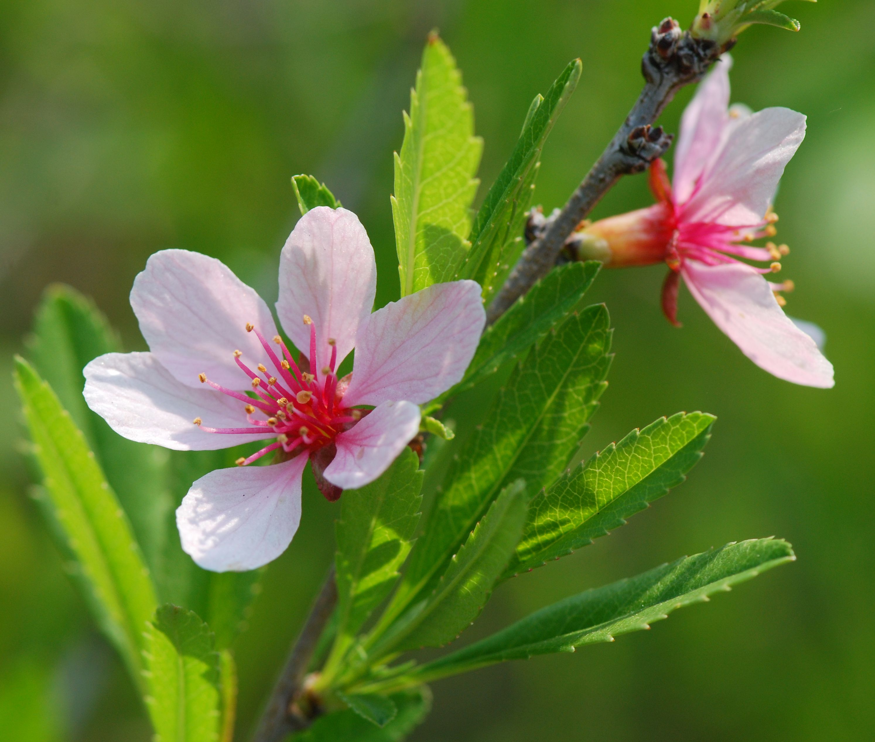 Prunus tenella, jardin des Plantes de Paris